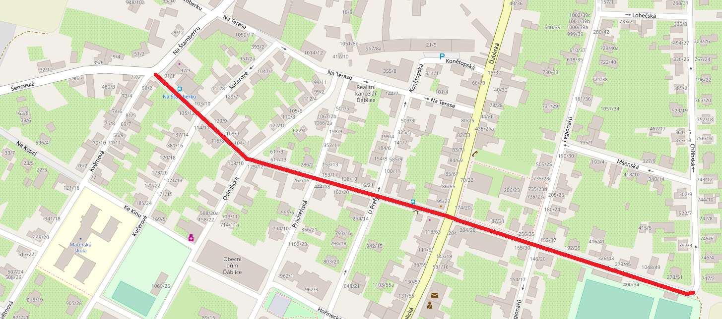 Pražská ulice Kokořínská zvýrazněná na mapě.